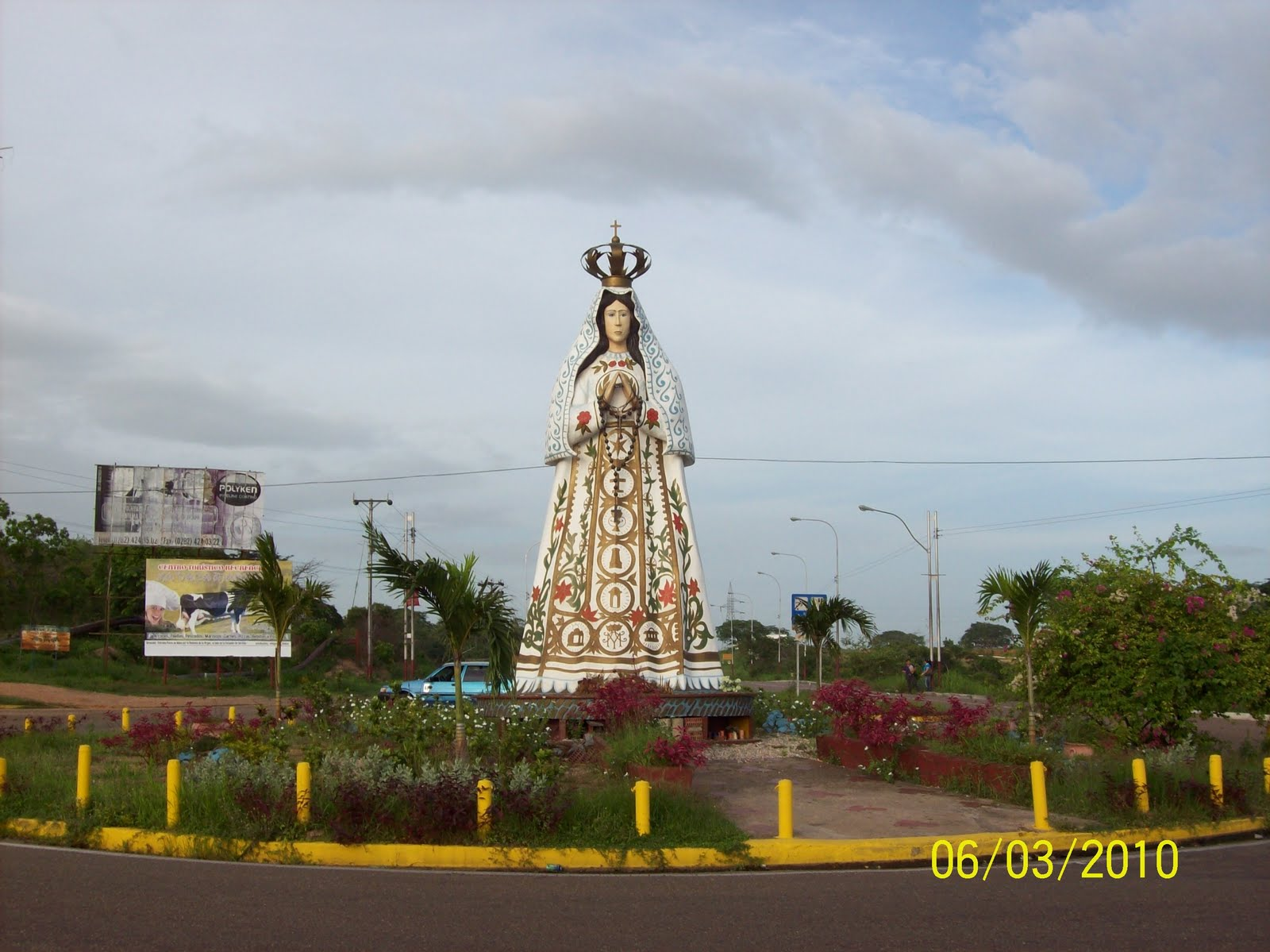 Monumenro a la VIRGEN DEL VALLE. (crucero de la virgen)